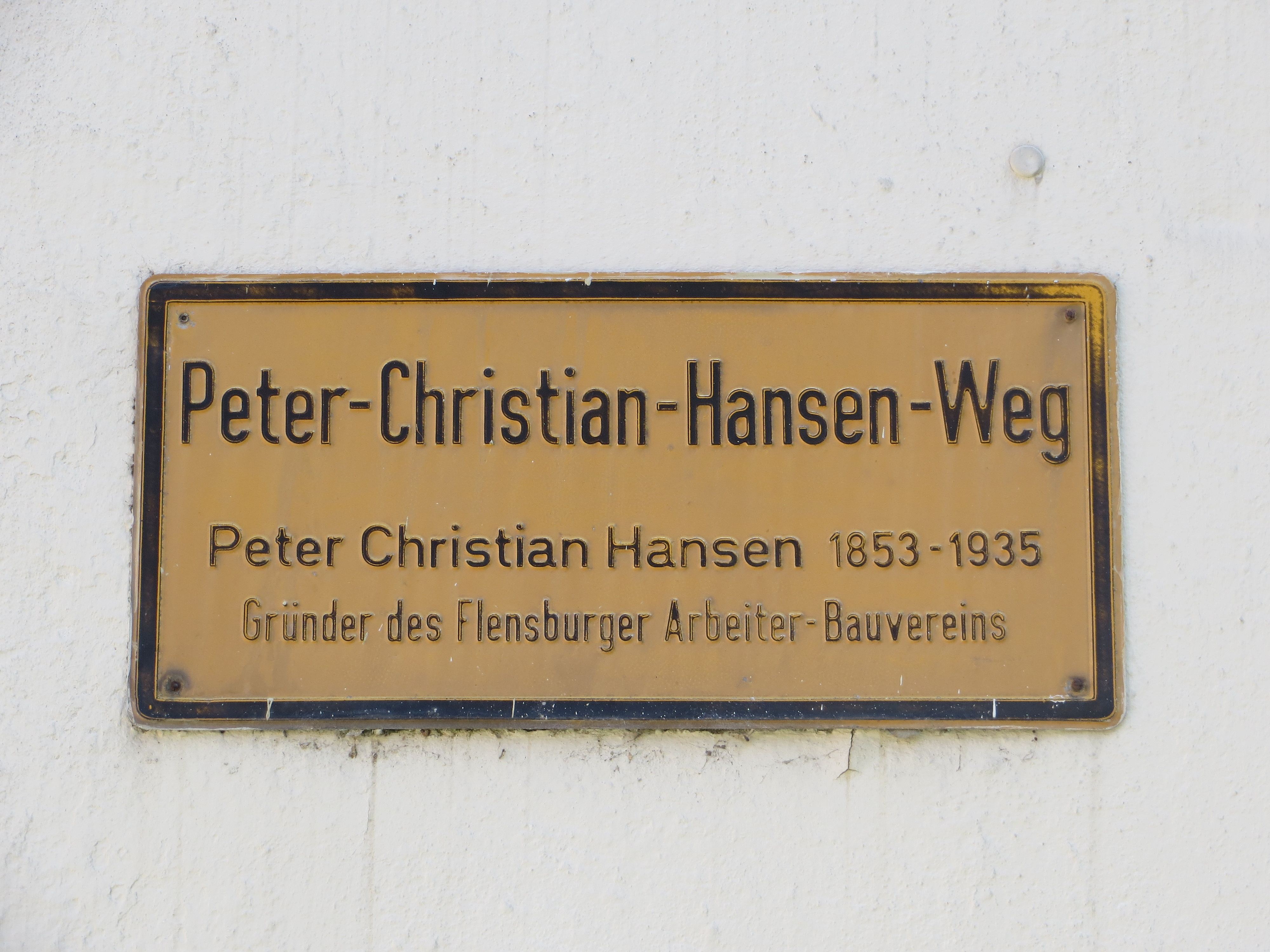 Gedenkschild zu Peter-Christian-Hansen, 1853-1935, Gründer des Flensburger Arbeiter Bauvereins (FAB)